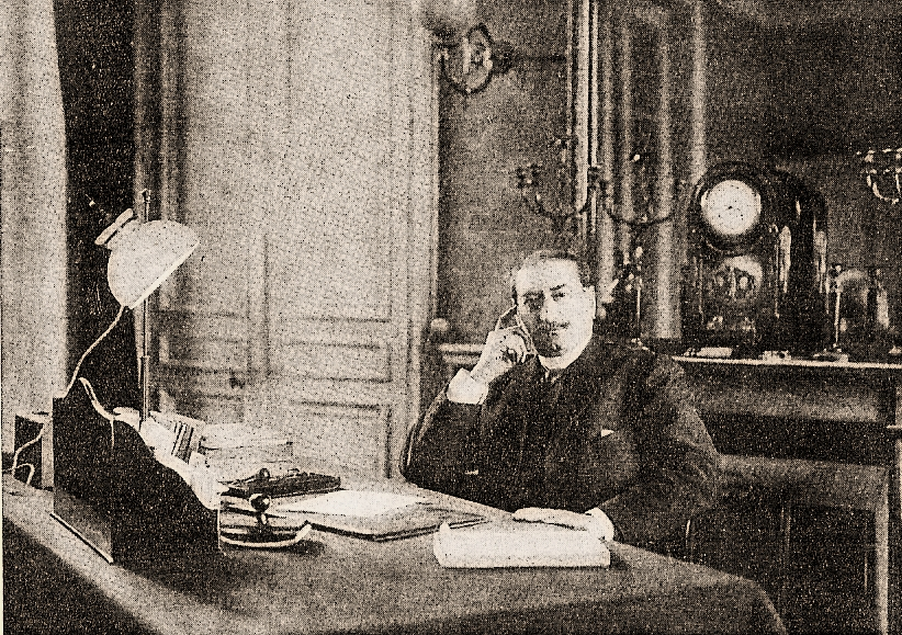 Photo de Georges Saumande assis (1851-1930).